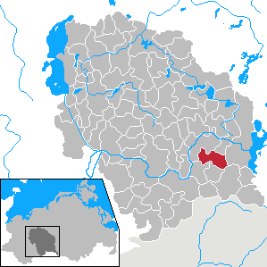 Kritzow in Mecklenburg-Vorpommern - District Parchim